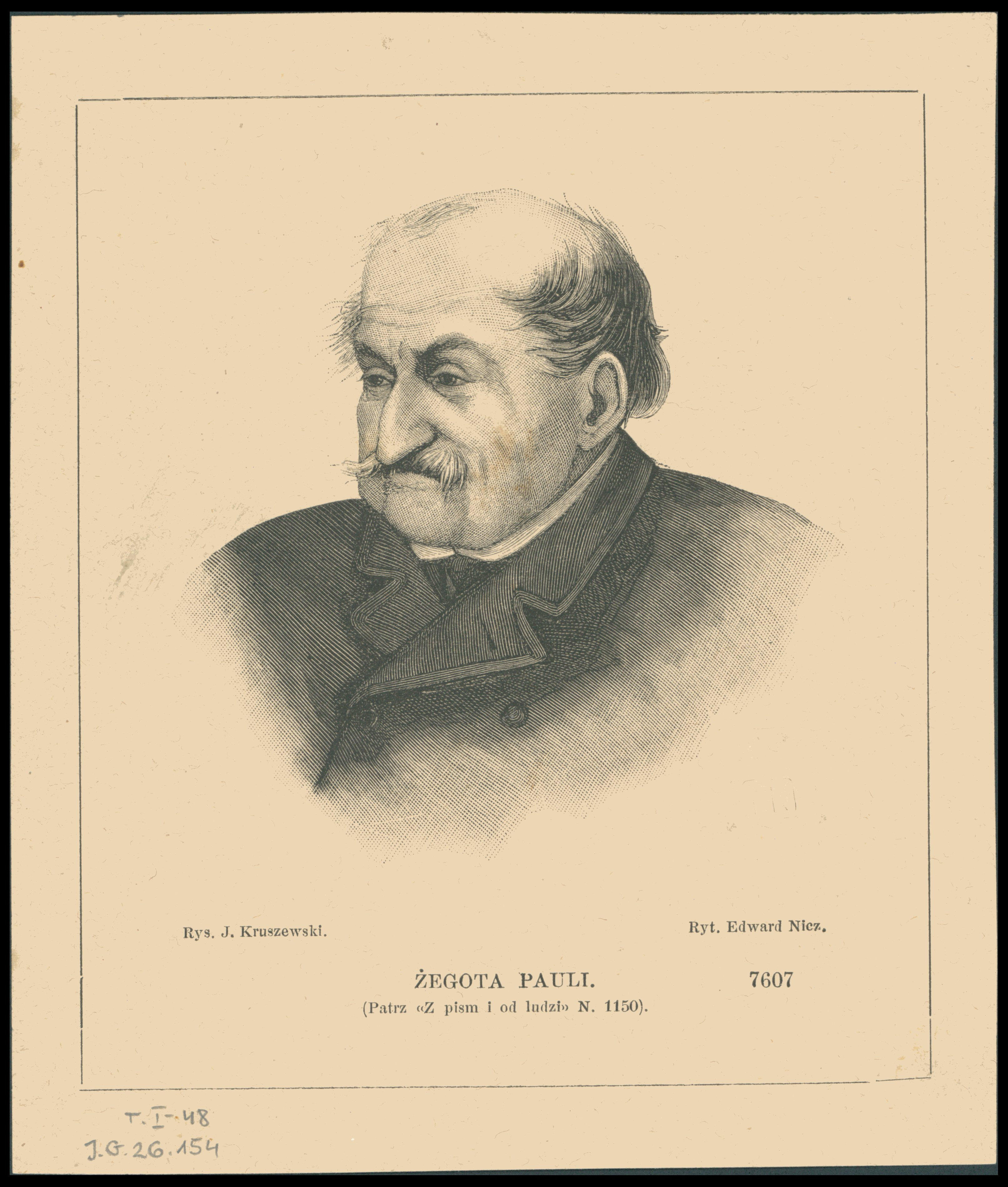 Żegota Pauli wg. drzeworytu autorstwa Edwarda Nicza i Józefa Kruszewskiego, [1887]